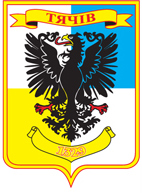 Герб міста Тячів